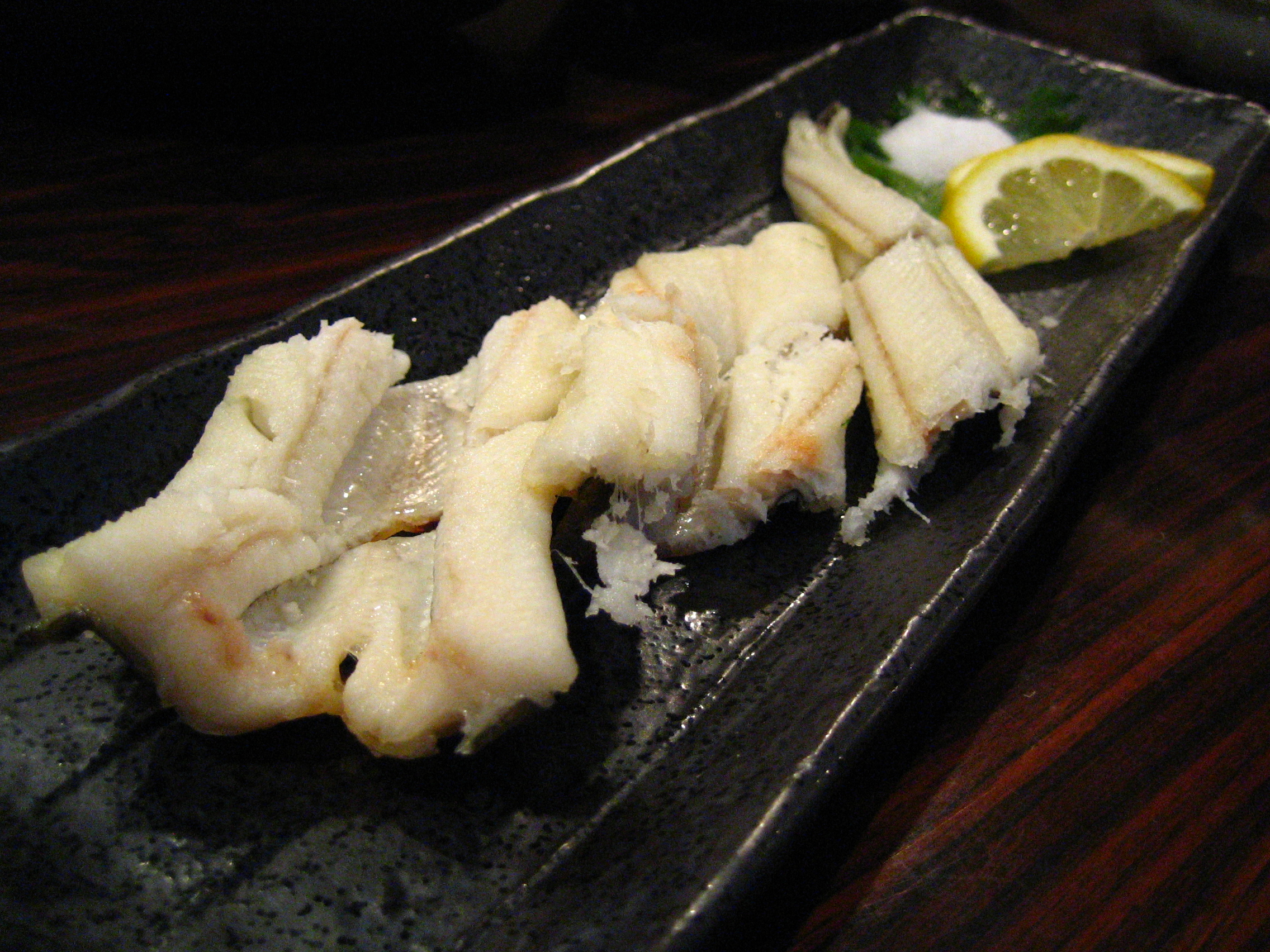 Grilled congridae (eel).